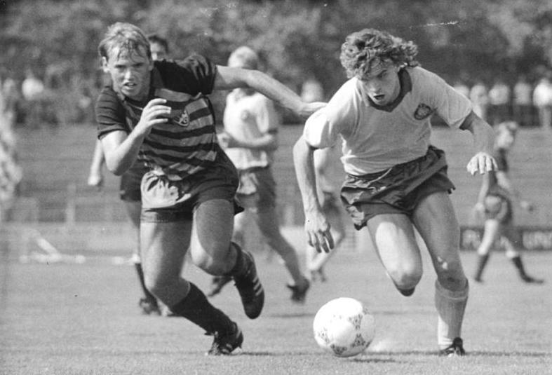 ADN-ZB-Kluge -22.8.87-zei-Leipzig: Fußball-Oberliga- 1. FC Lok Leipzig - BFC Dynamo 1:1- Spannend war dieser Zweikampf zwischen Heiko Scholz (FCL,r.) und BFC-Verteidiger Marco Köller verlief die gesamte Partie zwischen Pokalsieger und Meister, die nach insgesamt ausgehlichenem Match 1:1 endete.